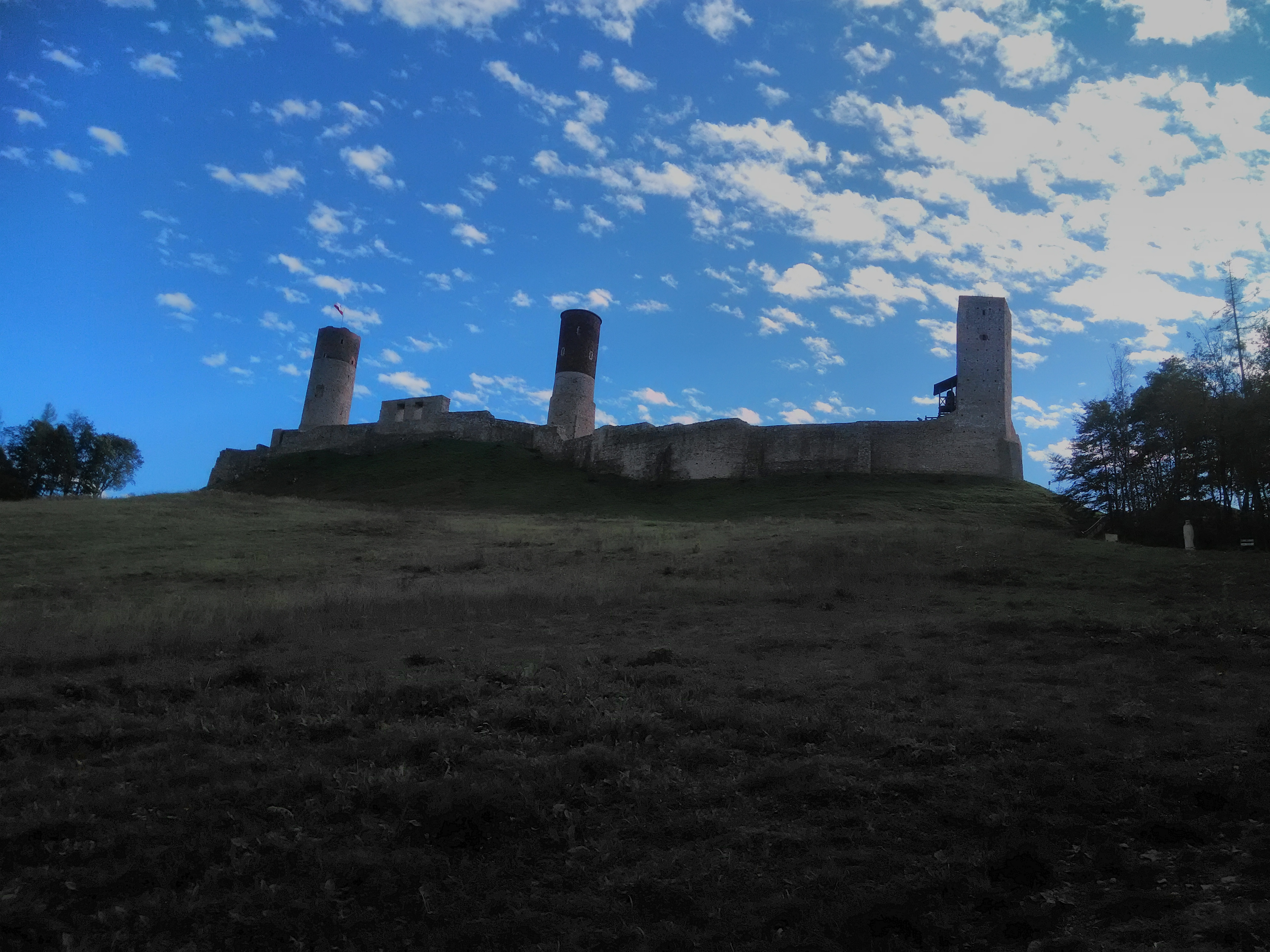 Chęciny, Zamek w Chęcinach Wikidata has entry Q4497261 with data related to this item.